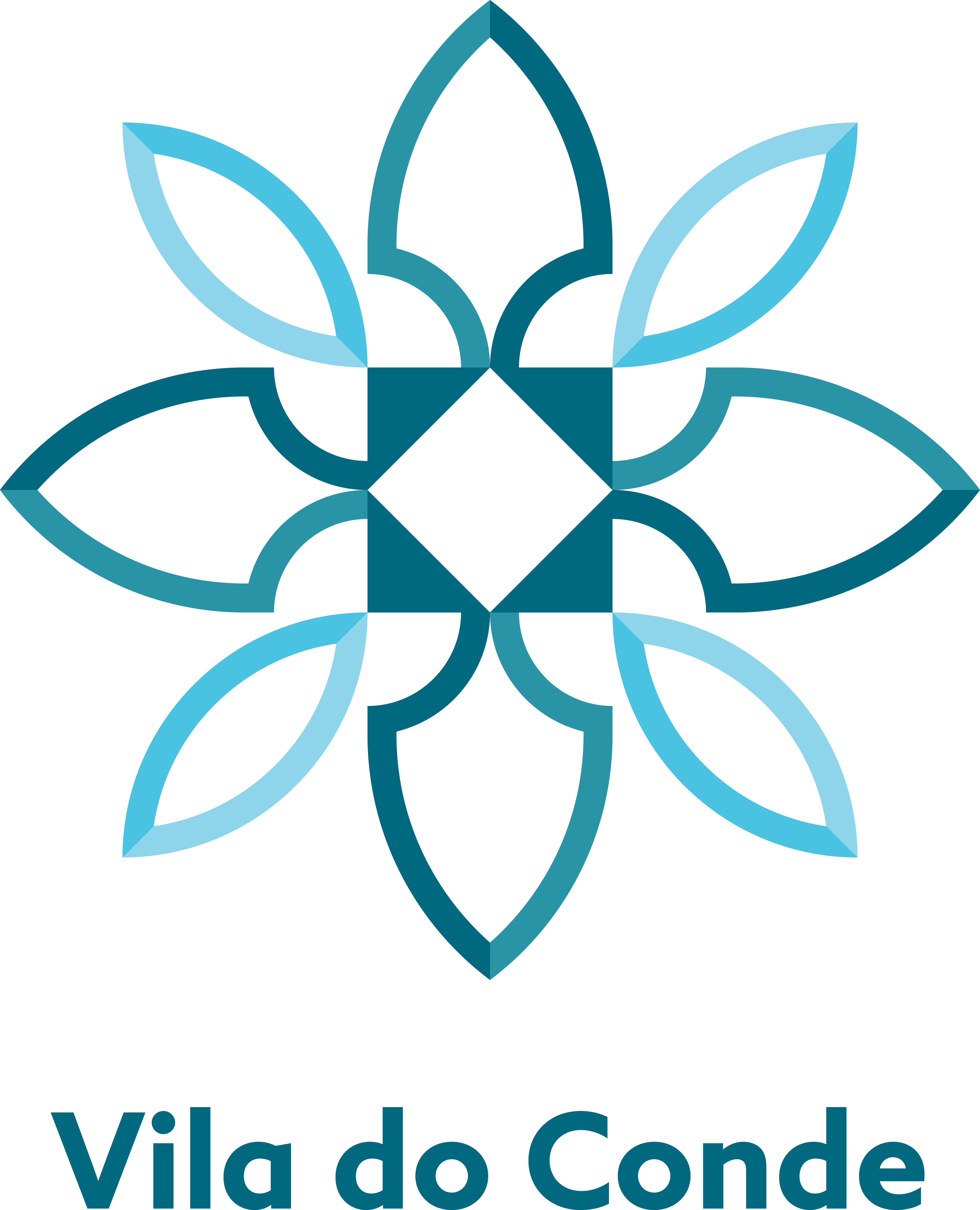 Logotipo da nova identidade de Vila do Conde.